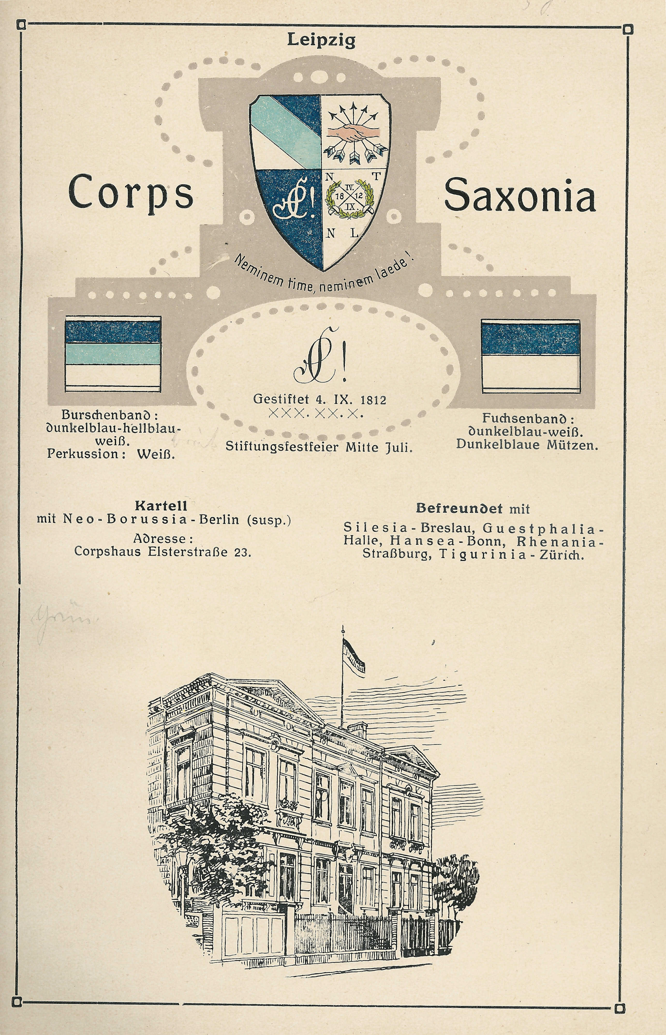 Wappen, Zrkel und Couleur des Corps Saxonia Leipzig